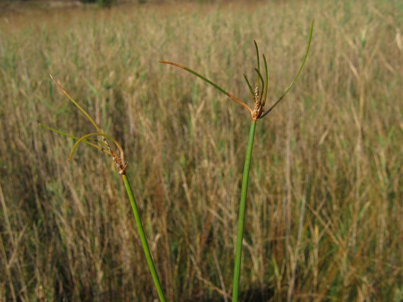 Vielstängelige Sumpfbinse (Eleocharis multicaulis), Viviparie